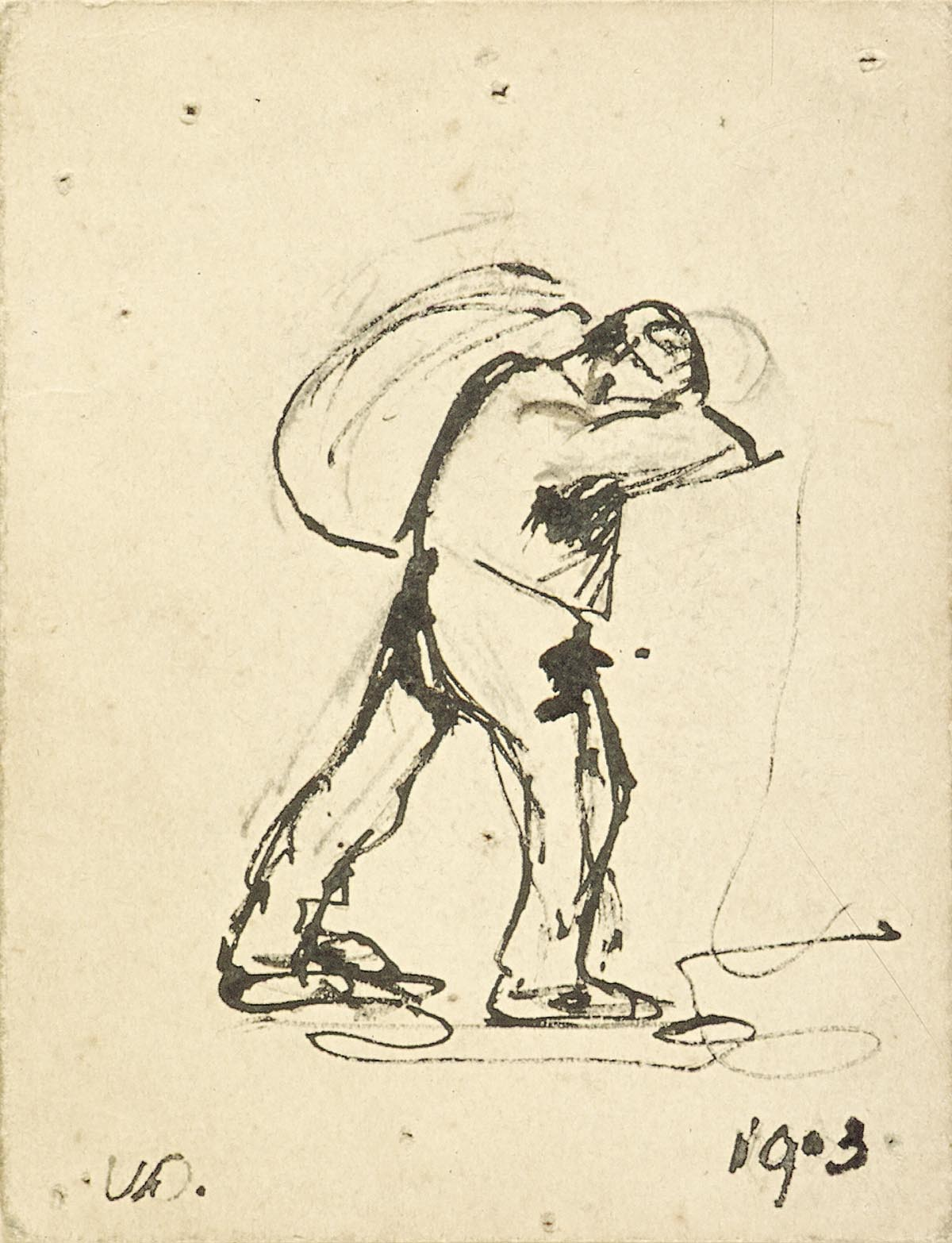 Lopende man met zak op de rug. 1903. Indian ink and charcoal on paper. Height: 14 cm (5.5 in); Width: 10.5 cm (4.1 in) dimensions QS:P2048,14U174728;P2049,10.5U174728. Utrecht, Centraal Museum.